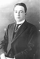 Fotografía de Baltasar Brum, presidente uruguayo entre 1919 y 1923.